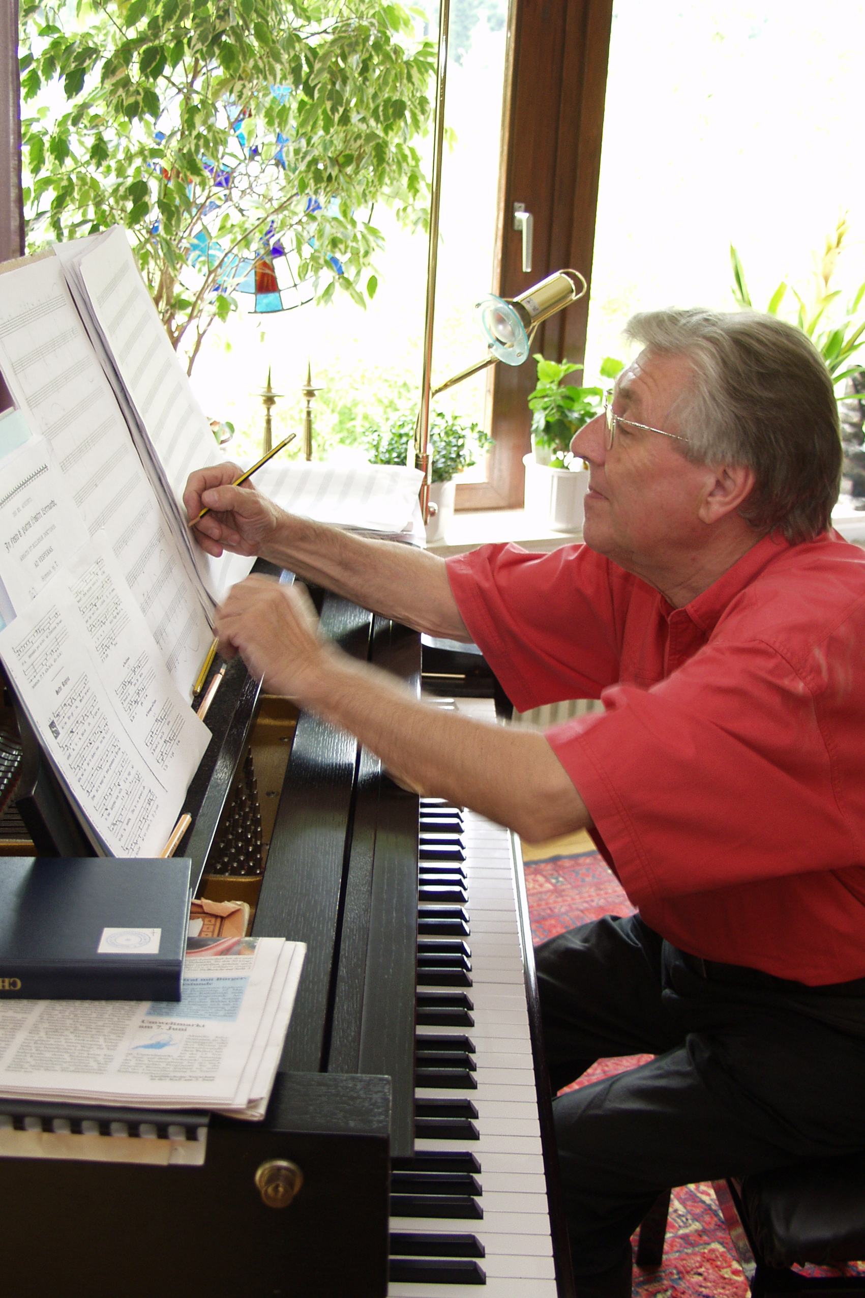 Portrait des Komponisten, Der Komponist bei der Arbeit